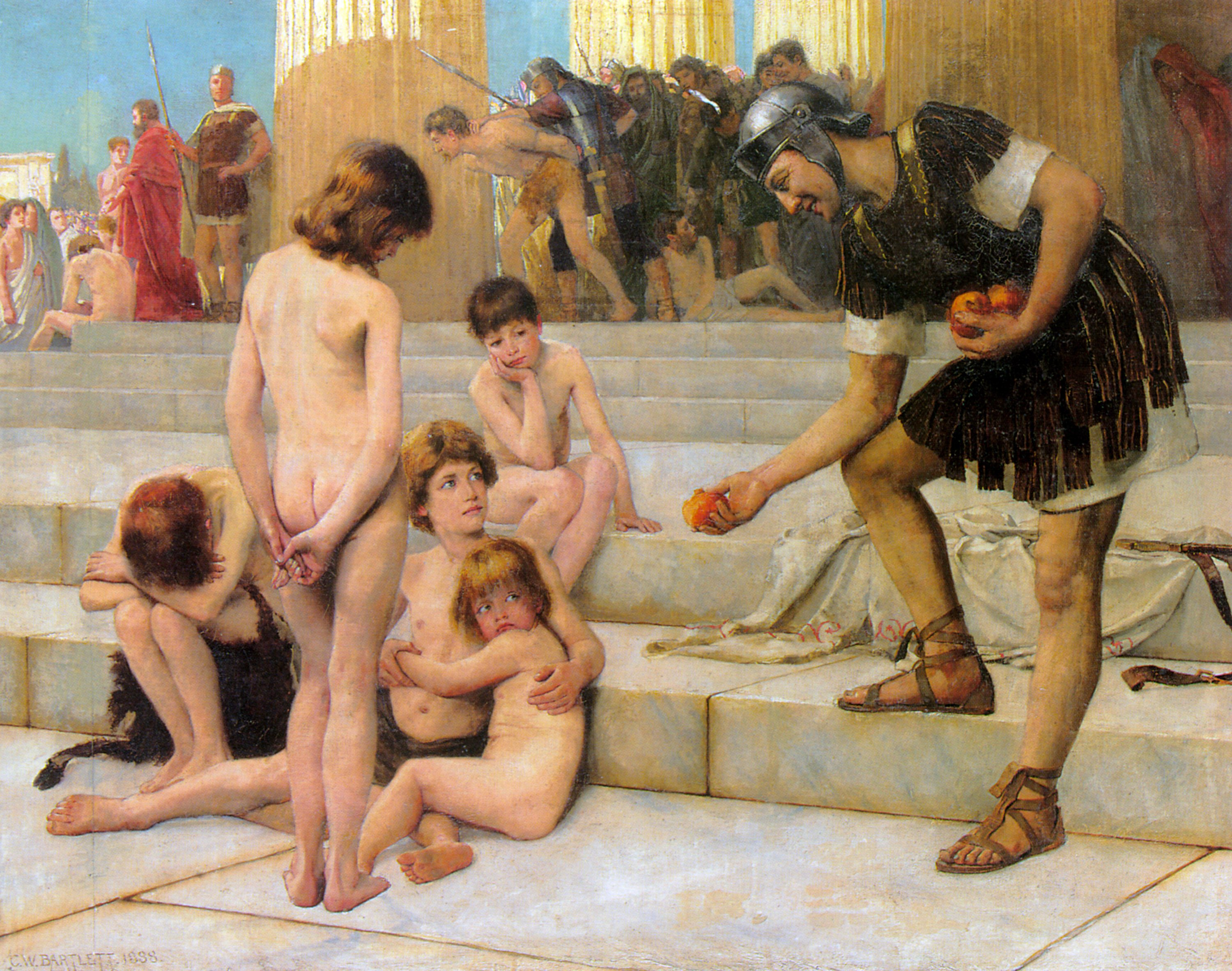 Captives in Romelabel QS:Len,"Captives in Rome" label QS:Lfr,"Captifs à Rome"